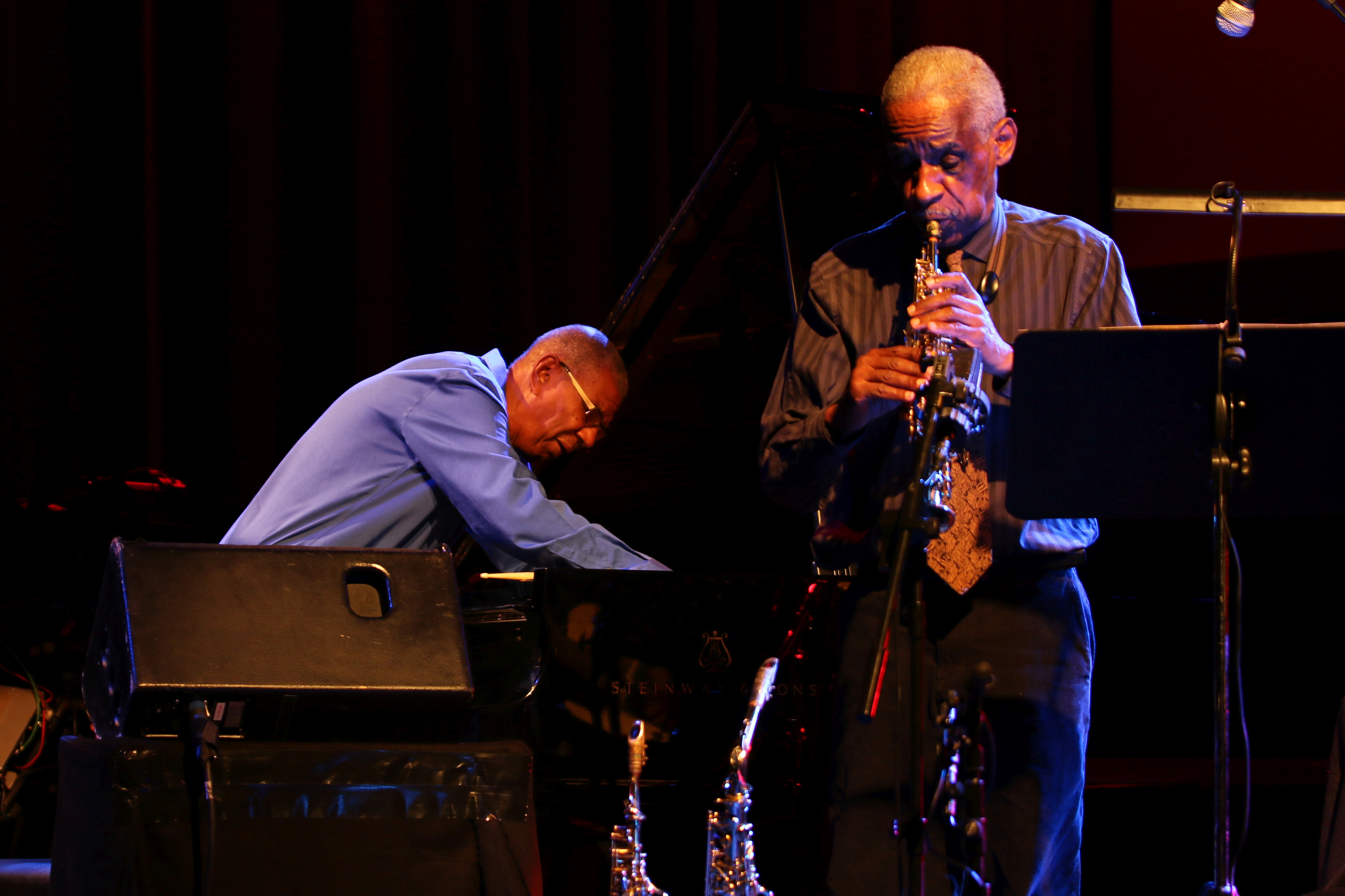 46. Deutsches Jazzfestival Frankfurt 2015: Jack DeJohnette und Roscoe Mitchell